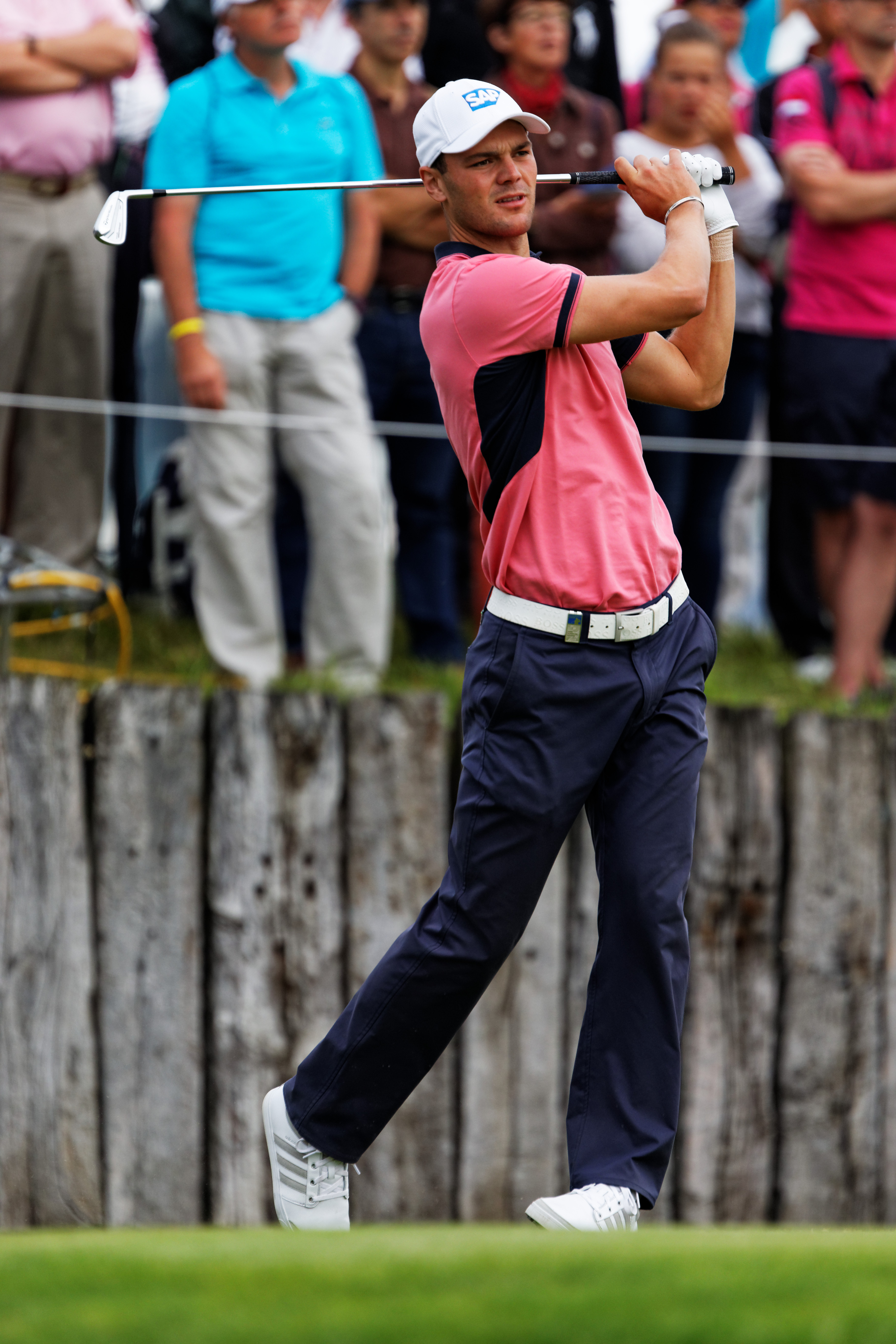 Martin Kaymer lors du second tour de l'Open de France 2014